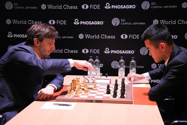 Грищук — Дин Лижэнь, Турнир Претендентов 2018